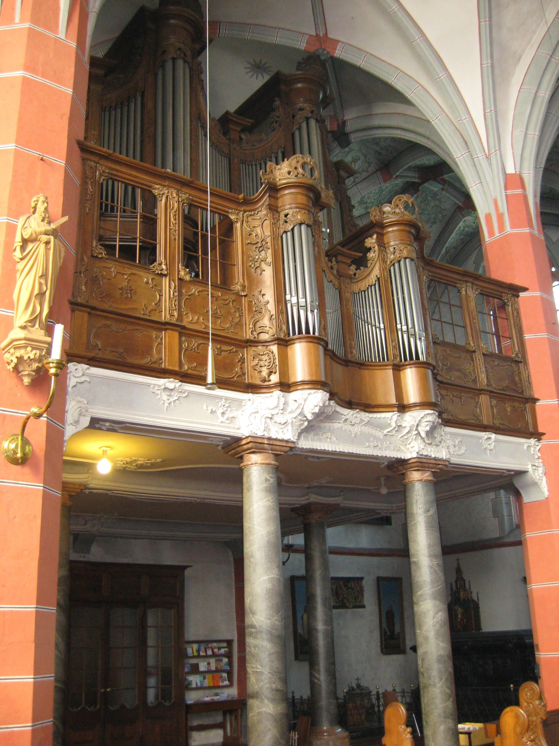 Schleiden, Schlosskirche, Orgel von C. Ludwig König, 1770 Datum: 25.04.2011 Urheber: M. Pfeiffer alias Benutzer:Gordito1869 Quelle: privates Fotoarchiv des Urhebers